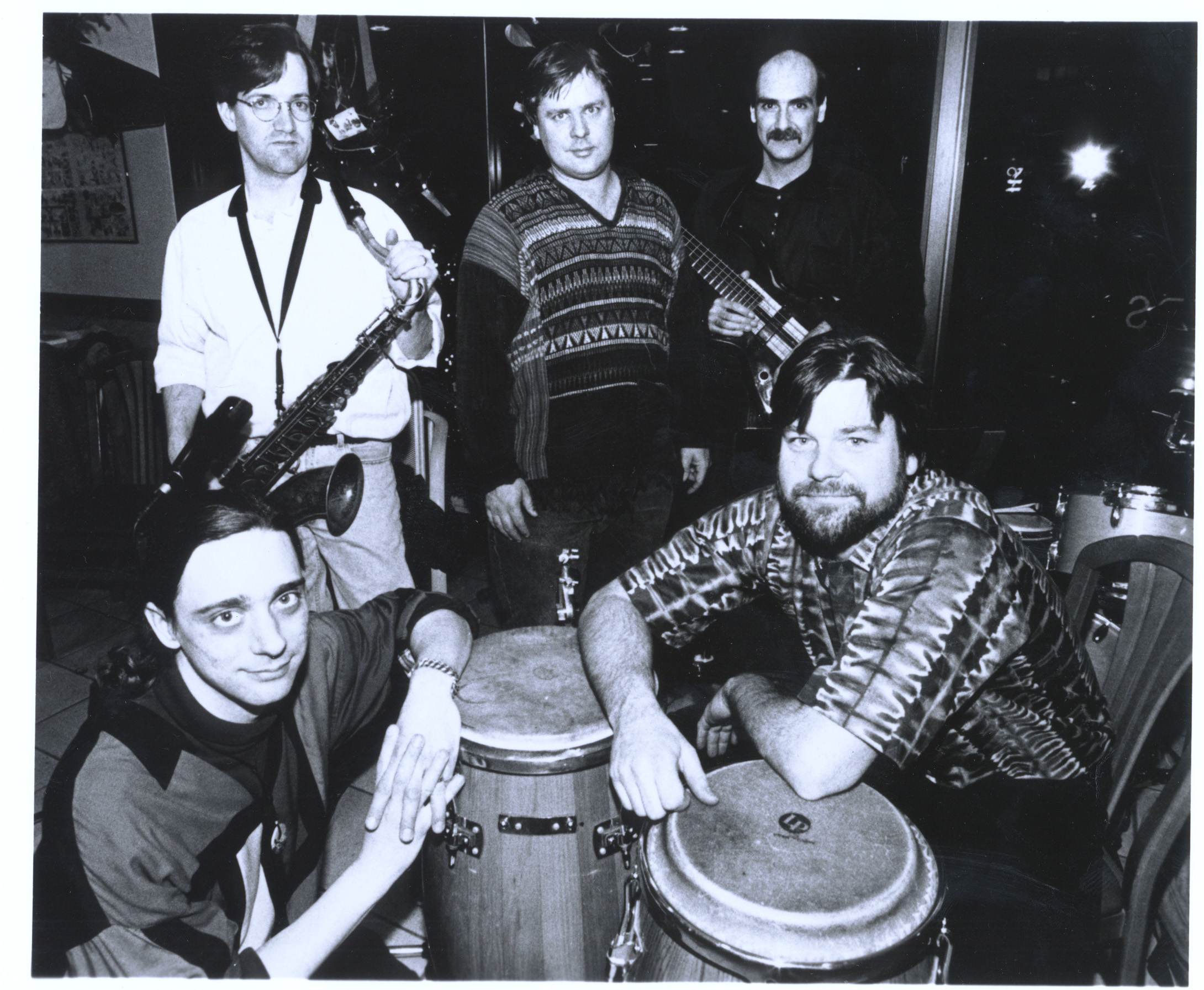 FLIPPOMUSIC quintet photo at Borders, 2000.